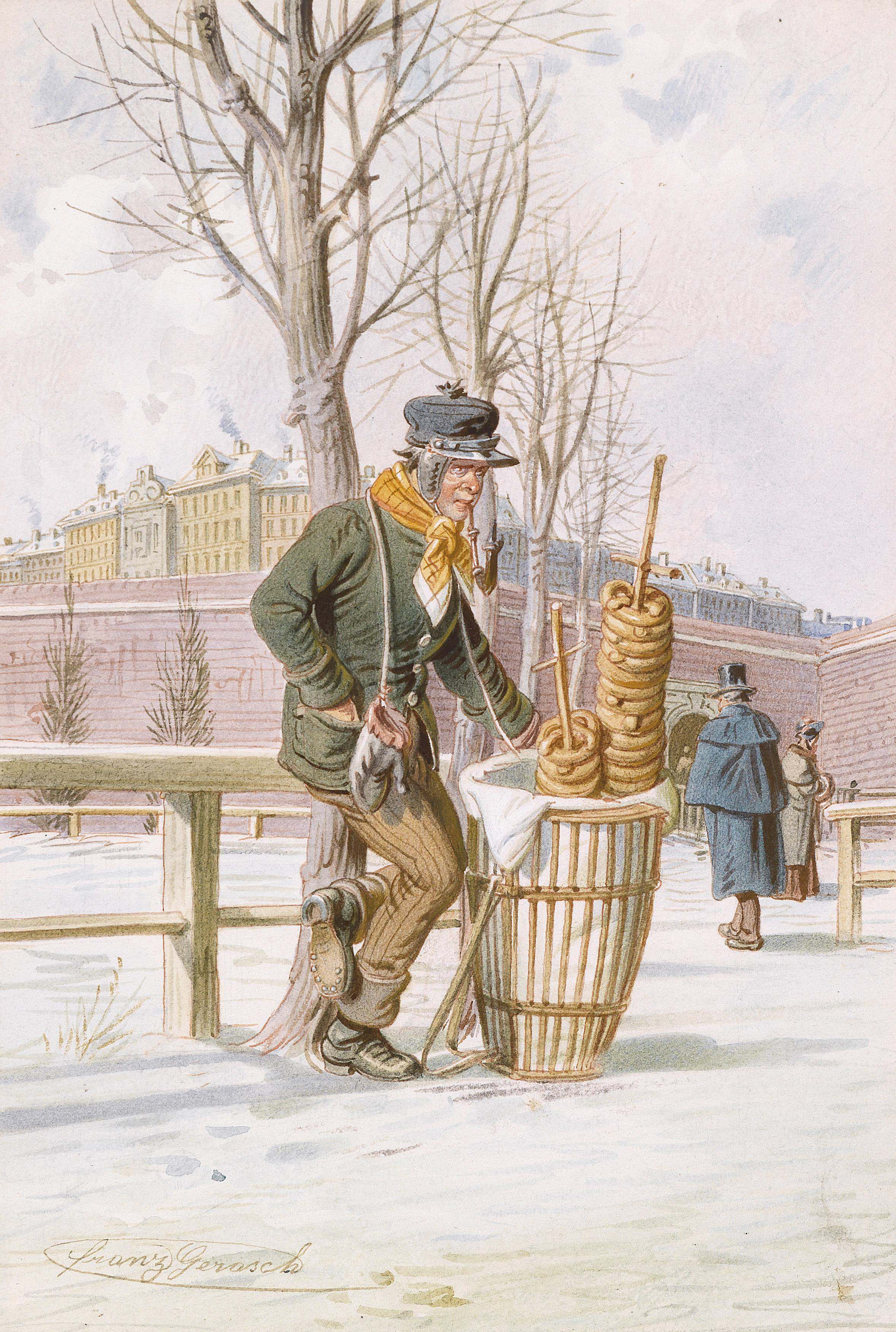 Der Pretzenbäck am Stubenthor-Glacis (Wien) 1846